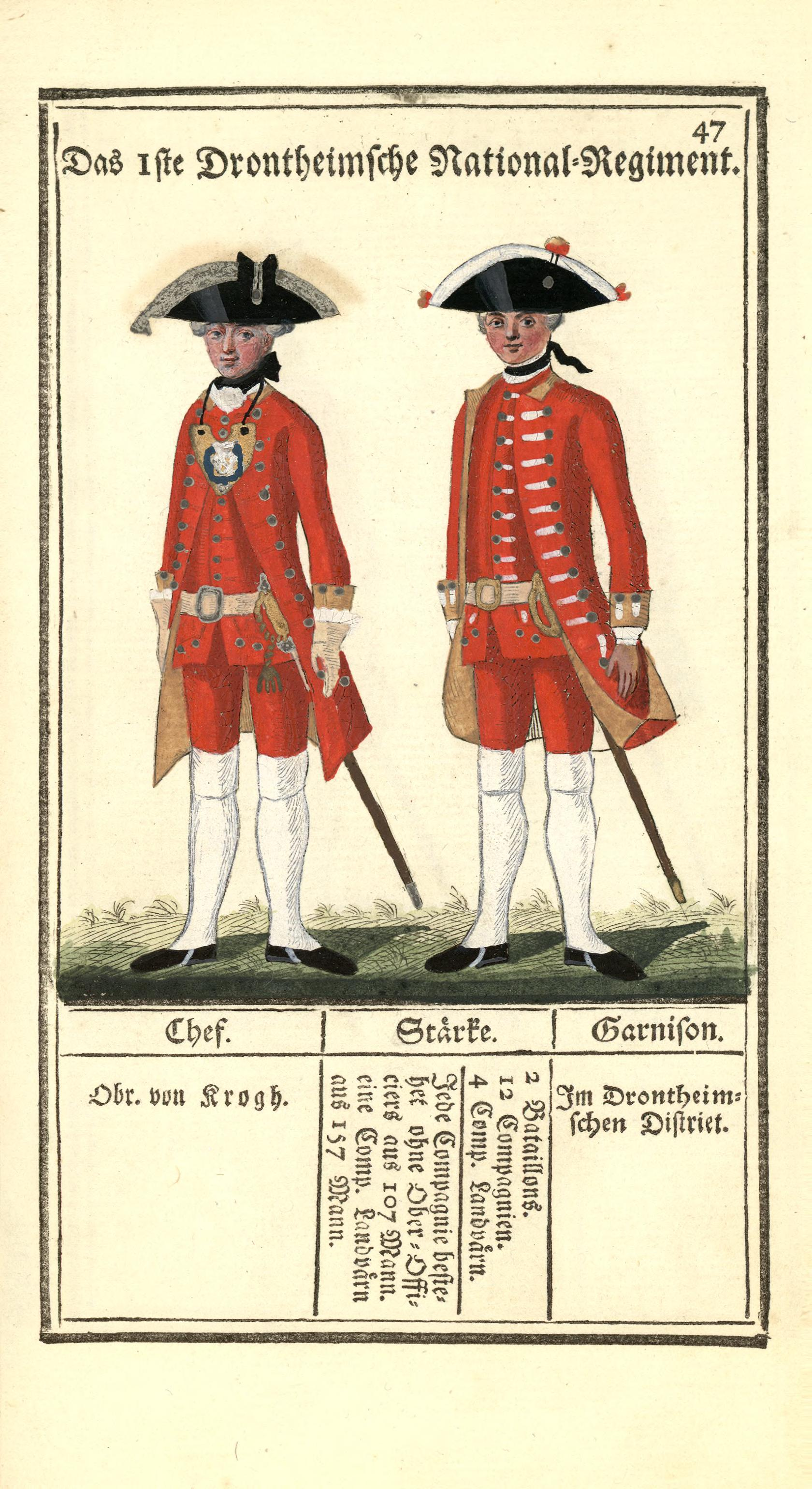 Illustrasjon hentet fra boken "Vorstellung der sämtlichen Königl. Dänischen Armee" av Bertram, Carl og utgitt av Carl Bertram (dk, 1763)